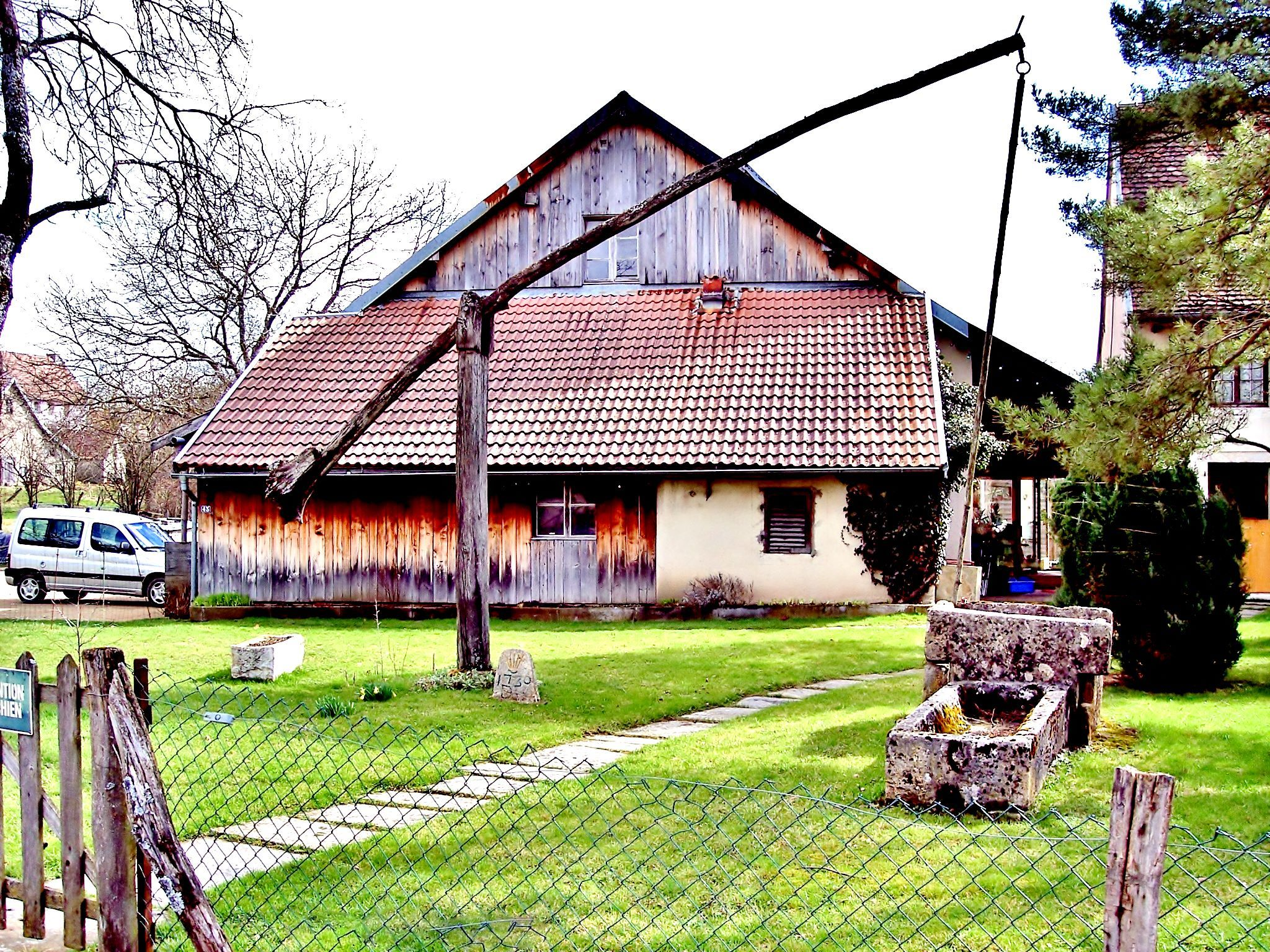 Puits à balancier. Croix. Territoire de Belfort.